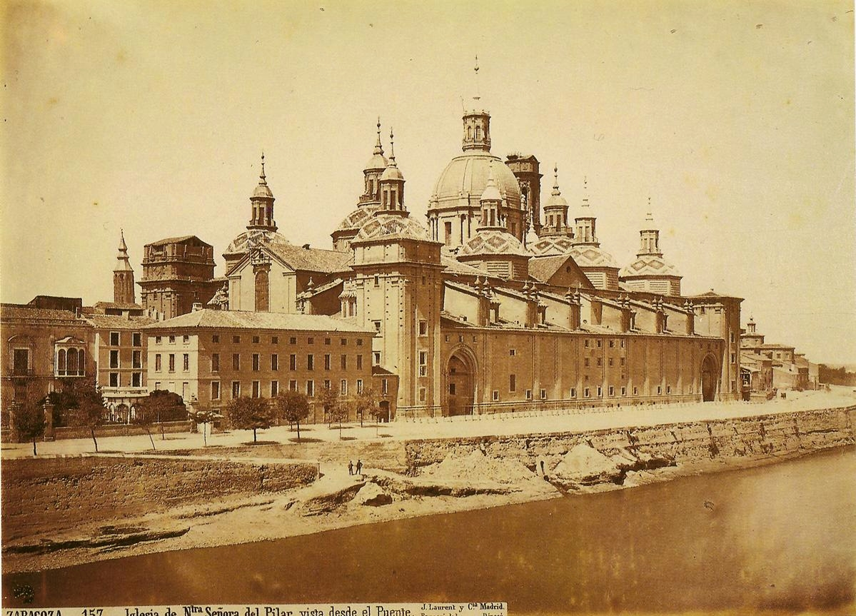 J. Laurent, Iglesia de Nuestra Señora del Pilar vista desde el puente, Zaragoza, c. 1875. Copia a la albúmina